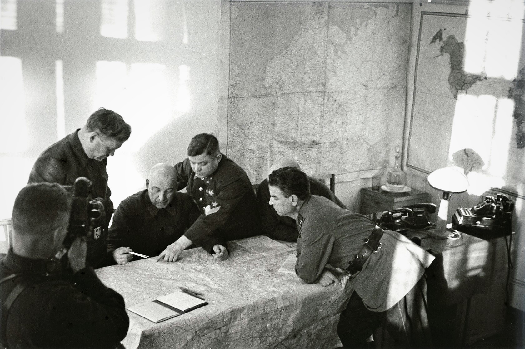 Военный совет Северо-Западного фронта: на совете присутствуют слева направо: член Военного совета Северо-западного направления Н. А. Булганин, командующий Северо-Западным фронтом генерал-лейтенант П. А. Курочкин, начальник штаба фронта генерал-лейтенант Н. Ф. Ватутин, члены Военного совета фронта дивизионный комиссар А. М. Пронин (закрыт фигурой Богаткина) и корпусной комиссар В.Н. Богаткин. В кадр также попал, по всей видимости, фотокорреспондент Совинформбюро Г. Г. Петрусов